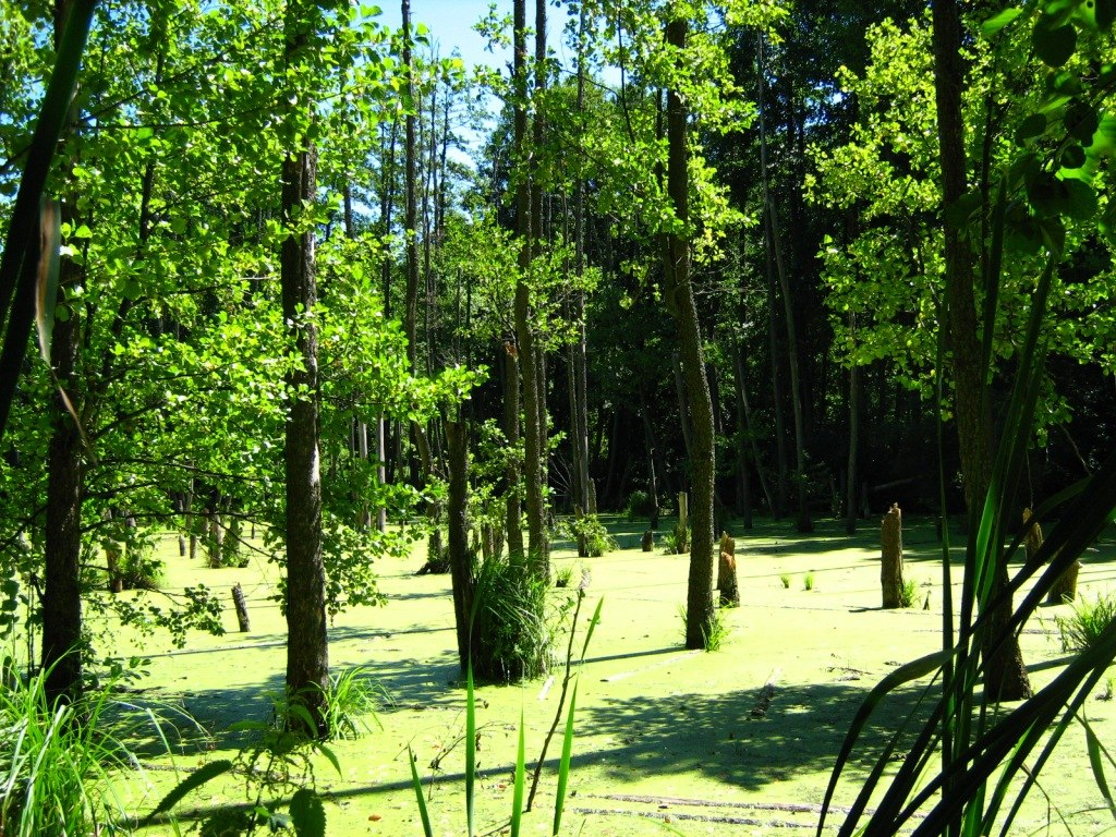 Слобожанский национальный природный парк